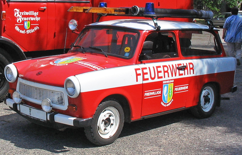 Trabant 601 bei der Freiwilligen Feuerwehr